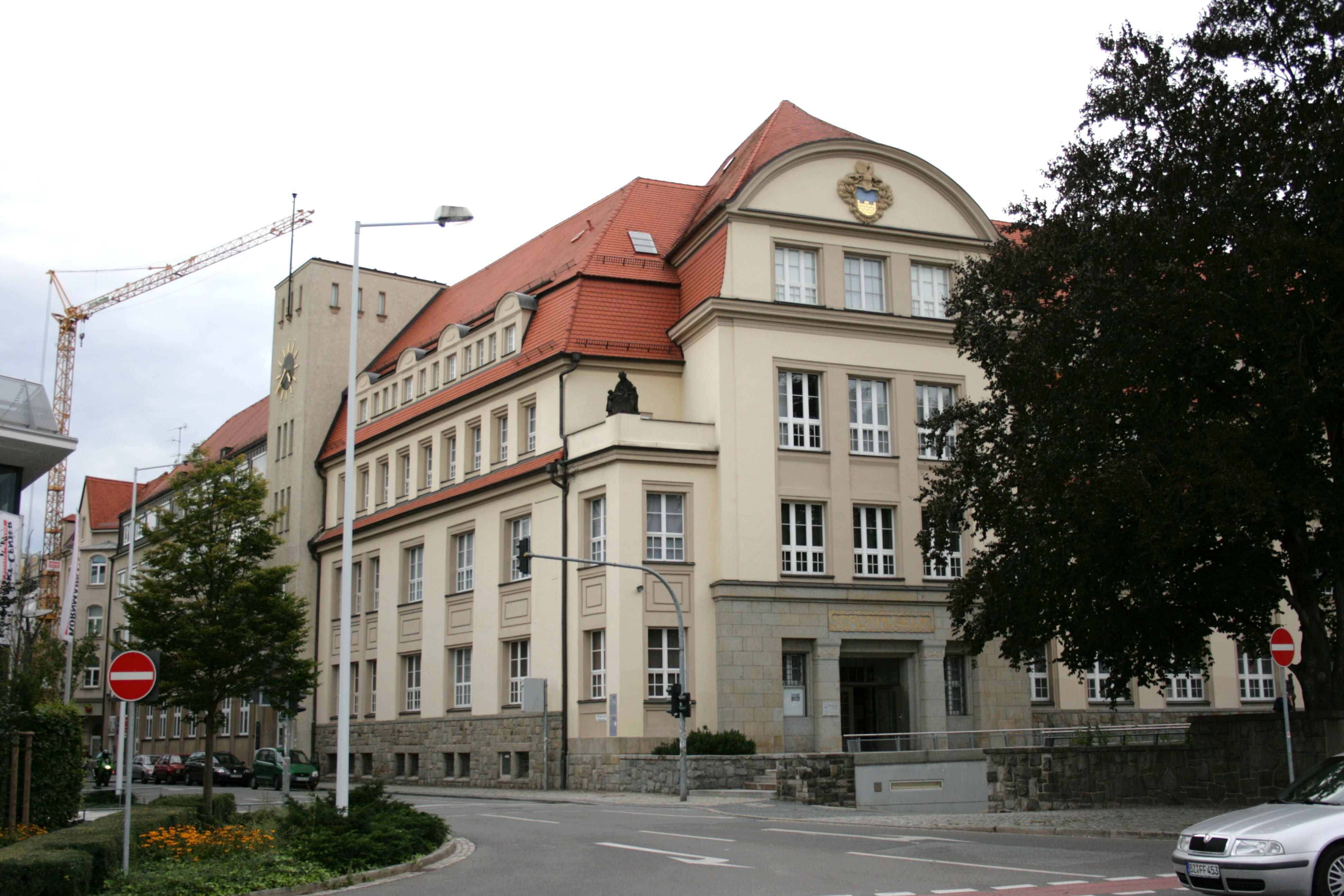 Stadtmuseum am Kornmarkt in Bautzen